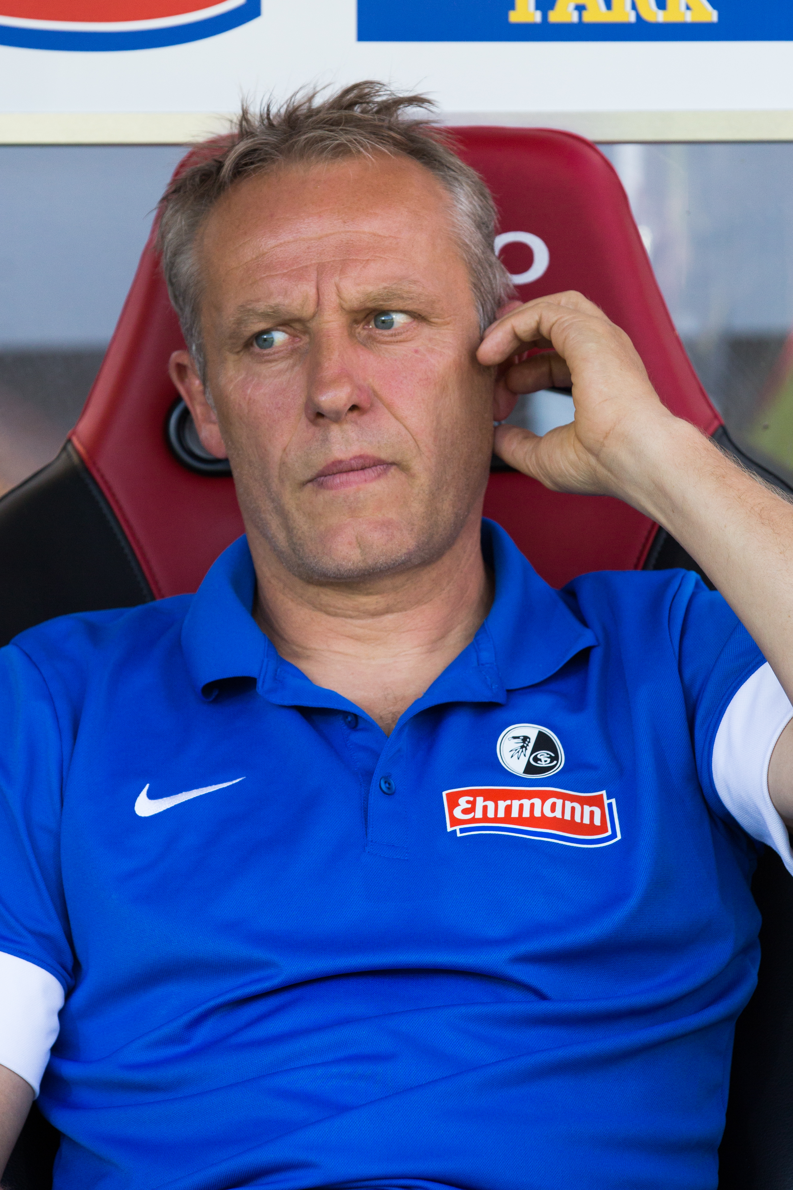 SC Freiburg vs FSVMainz 17 août 2013